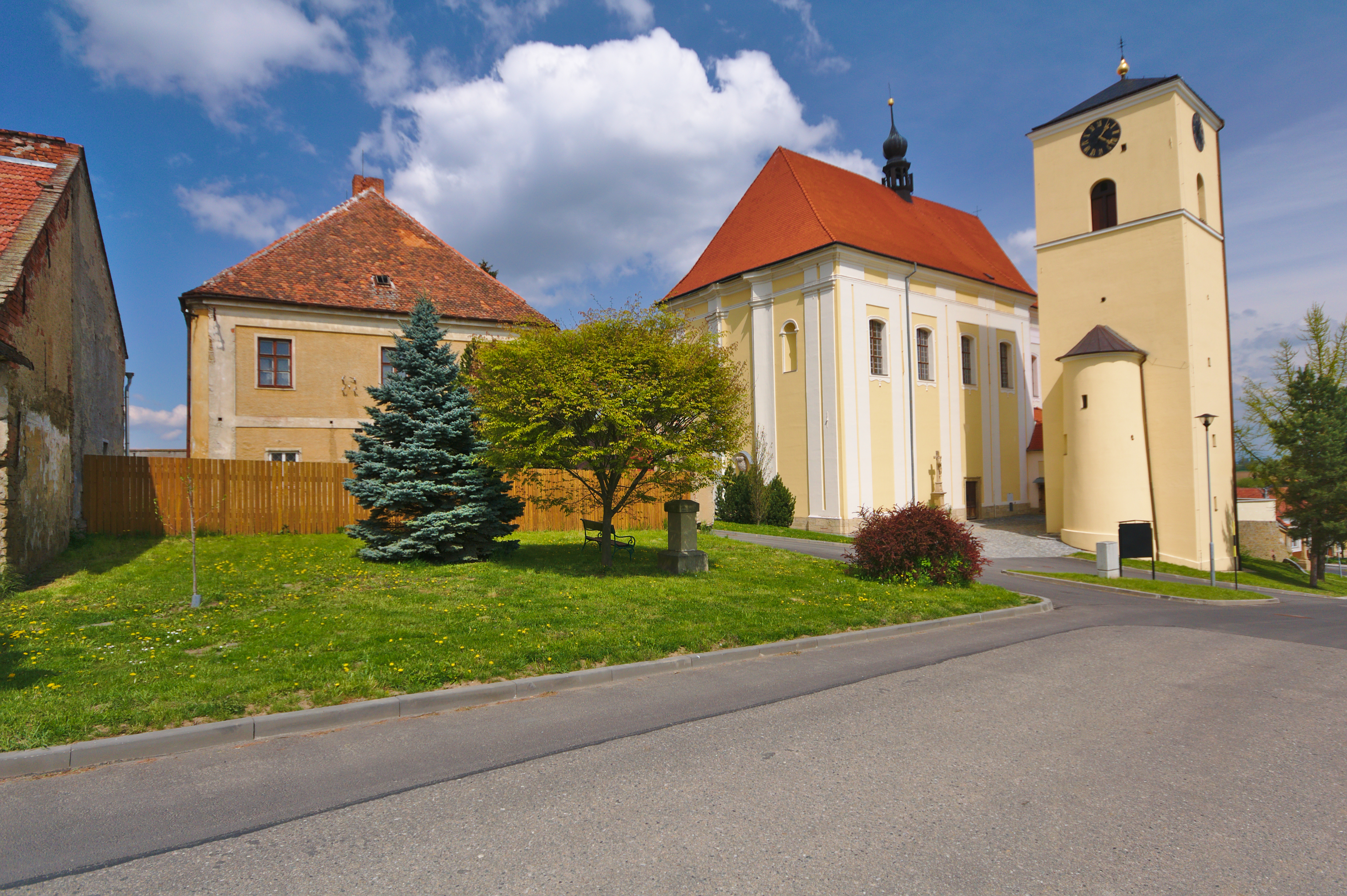 Kostel svatého Jana Křtitele, Určice, okres Prostějov